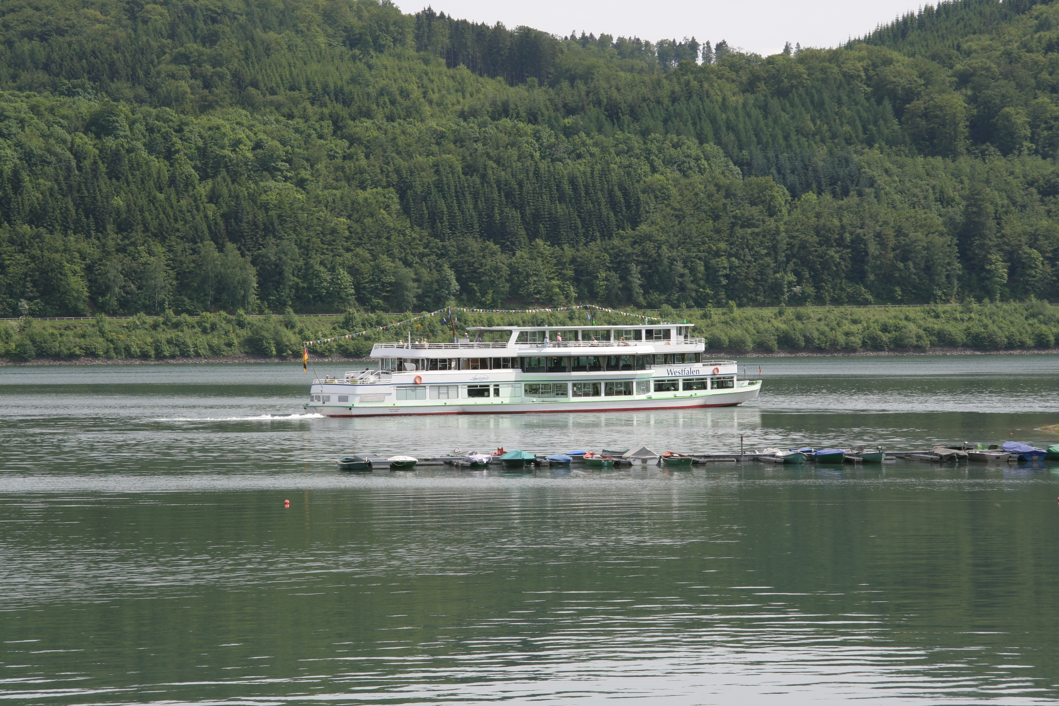 Am Biggedamm